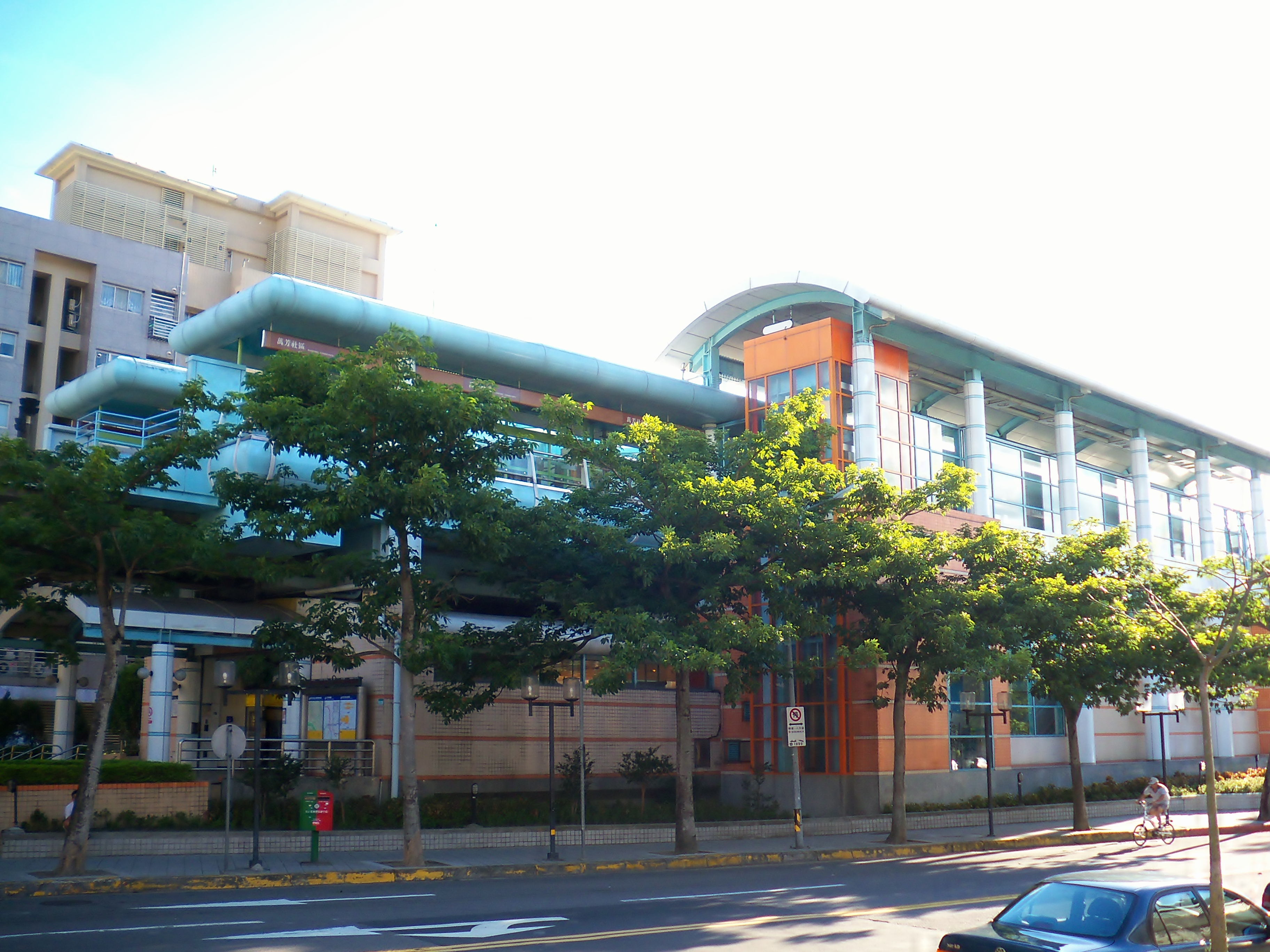 台北捷運文山線萬芳社区駅駅舎。